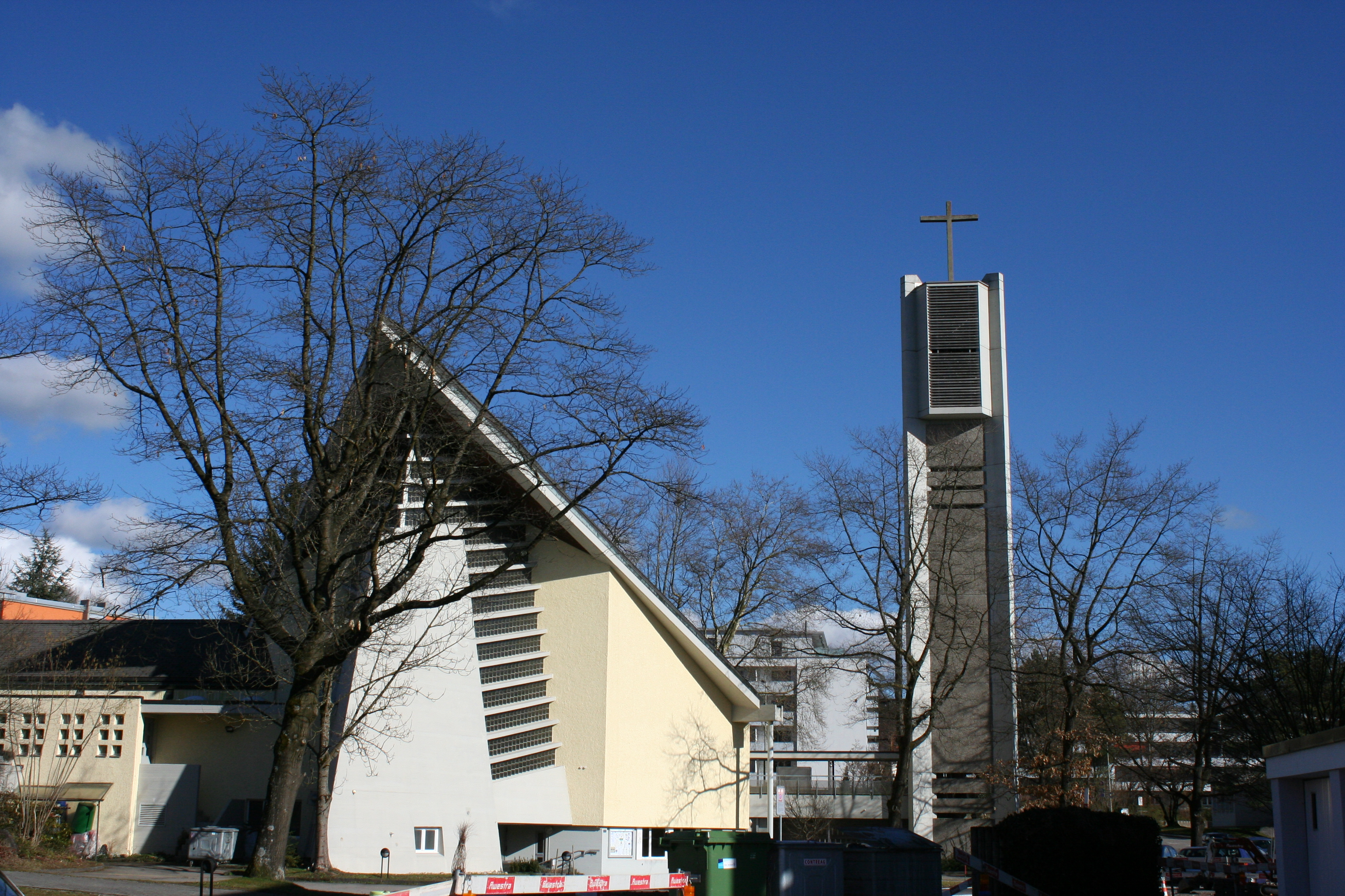 Römisch-katholische Pfarrkirche St. Benignus Pfäffikon ZH, Aussenansicht